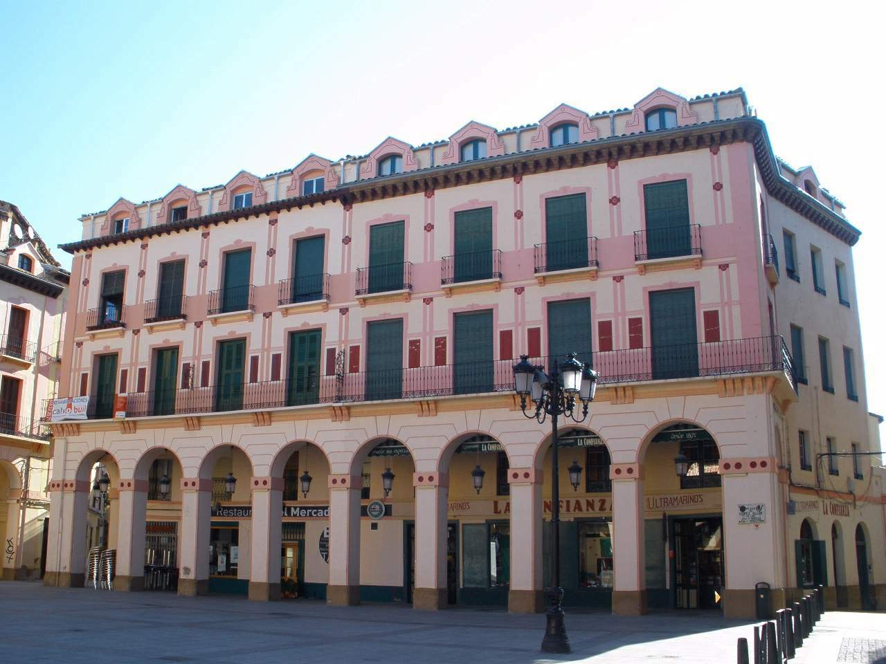 Plaza Luis López Allué (Huesca)